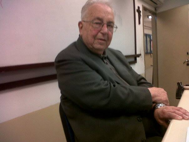 dictando Master Direccion Empresas - USAL - DEUSTO